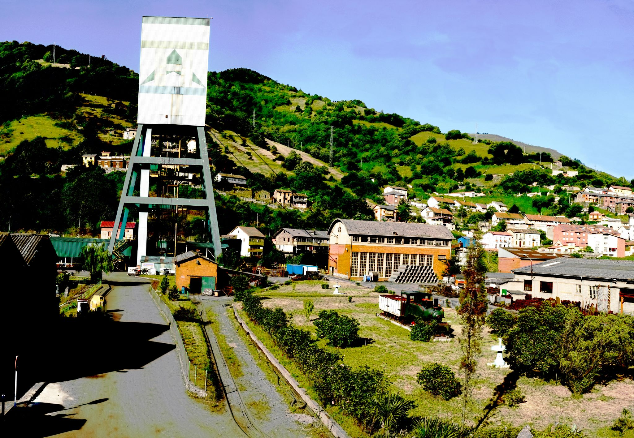 Pozo Santiago, mina/coal mine of Hunosa, in Aller, Asturias